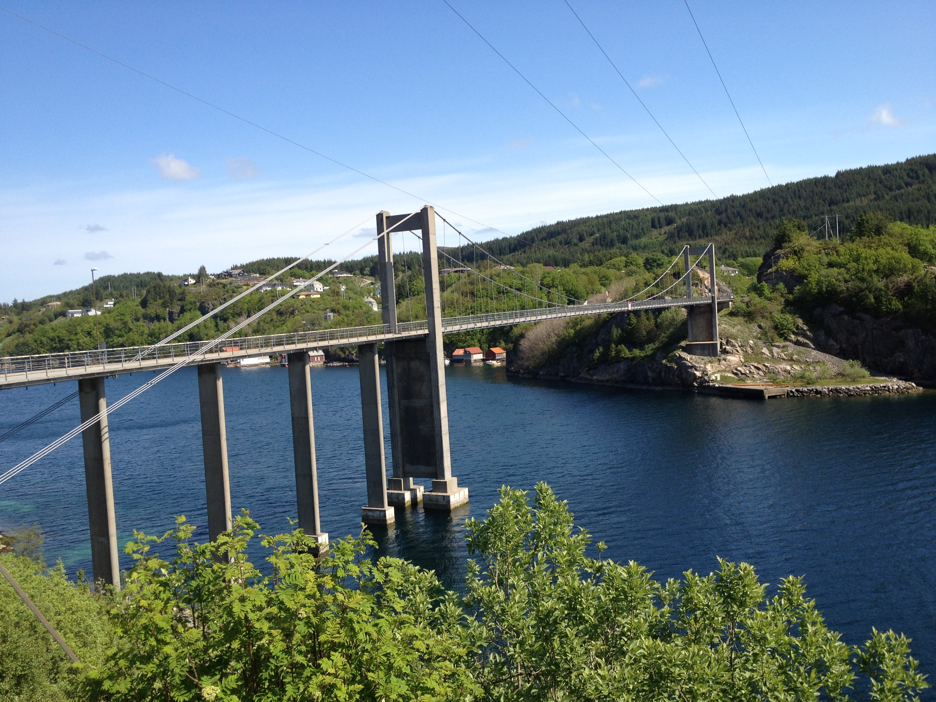 Tofterøybroen i Sund utenfor Bergen.